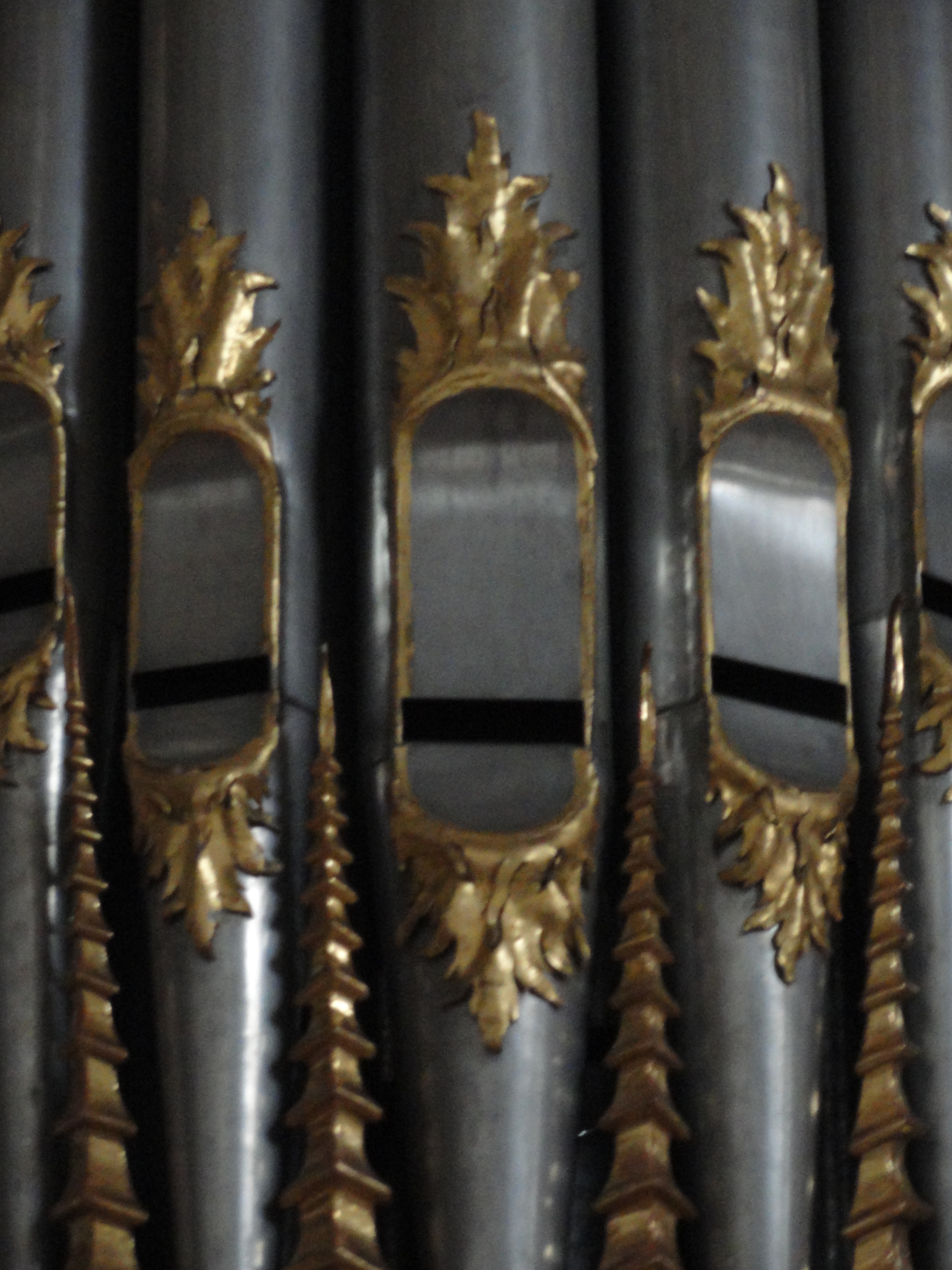 Metzler-Orgel Neustift Prospektpfeifen